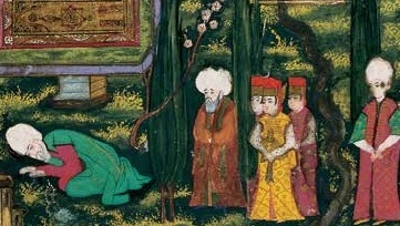 Kanunî Sultan Süleyman’ın isyan eden oğlu Şehzade Bayezid’e beddua etmesi